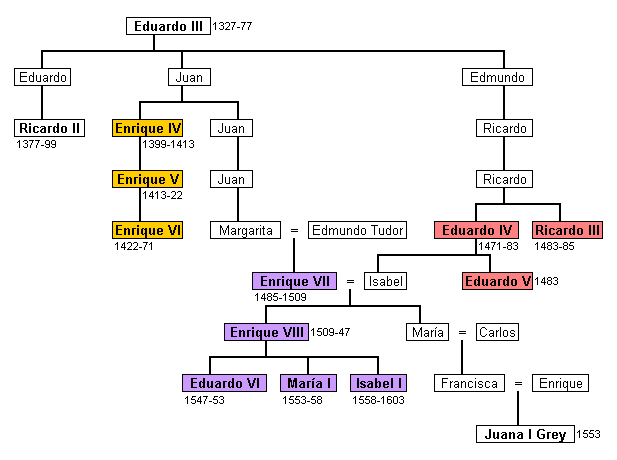 Árbol genealógico de los reyes de Inglaterra de la dinastía Tudor, incluyendo las casas de Lancaster y York, relacionados con la guerra de las Dos Rosas.